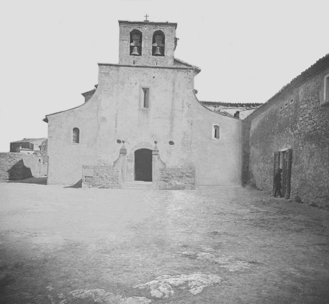 Façana de l ' església parroquial de Calders , dedicada a Sant Vicenç .